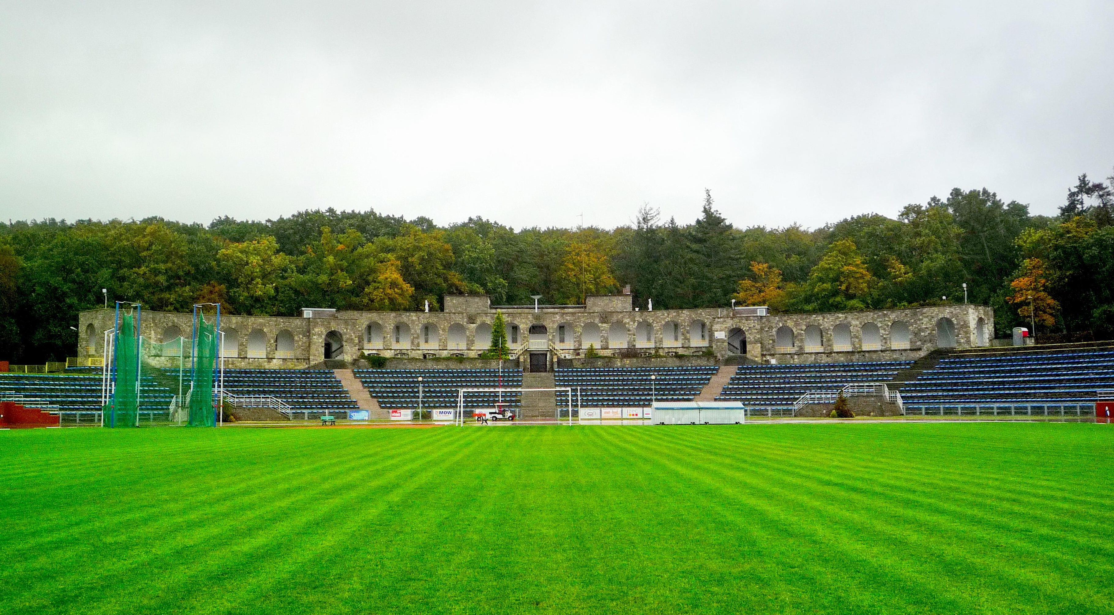 Arkady (trybuna południowa) na stadionie SOSiR w Słubicach.